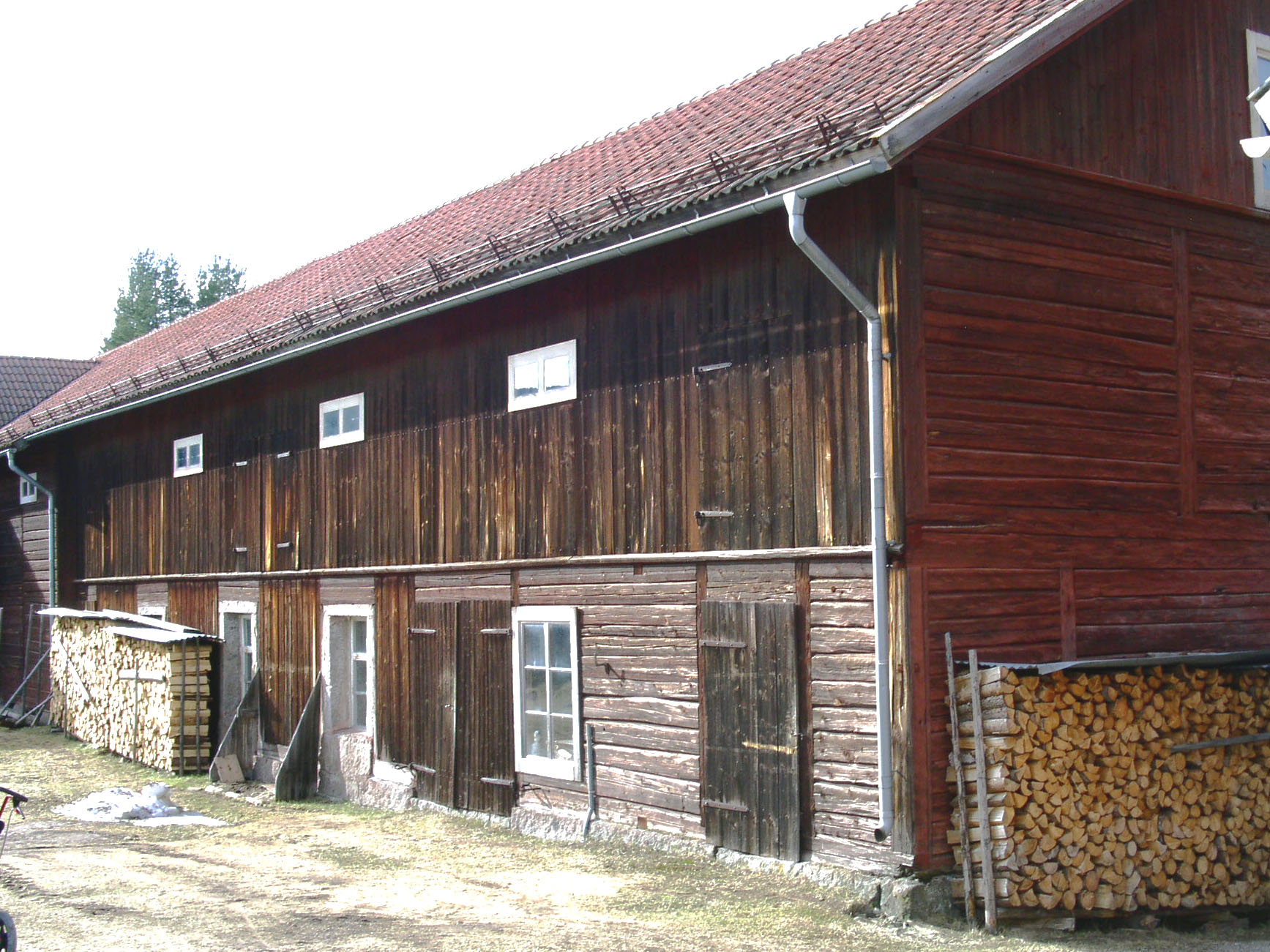 Större uthus delvis byggt i skiftesverksteknik utav timmer från äldre knuttimrade byggnader på gården